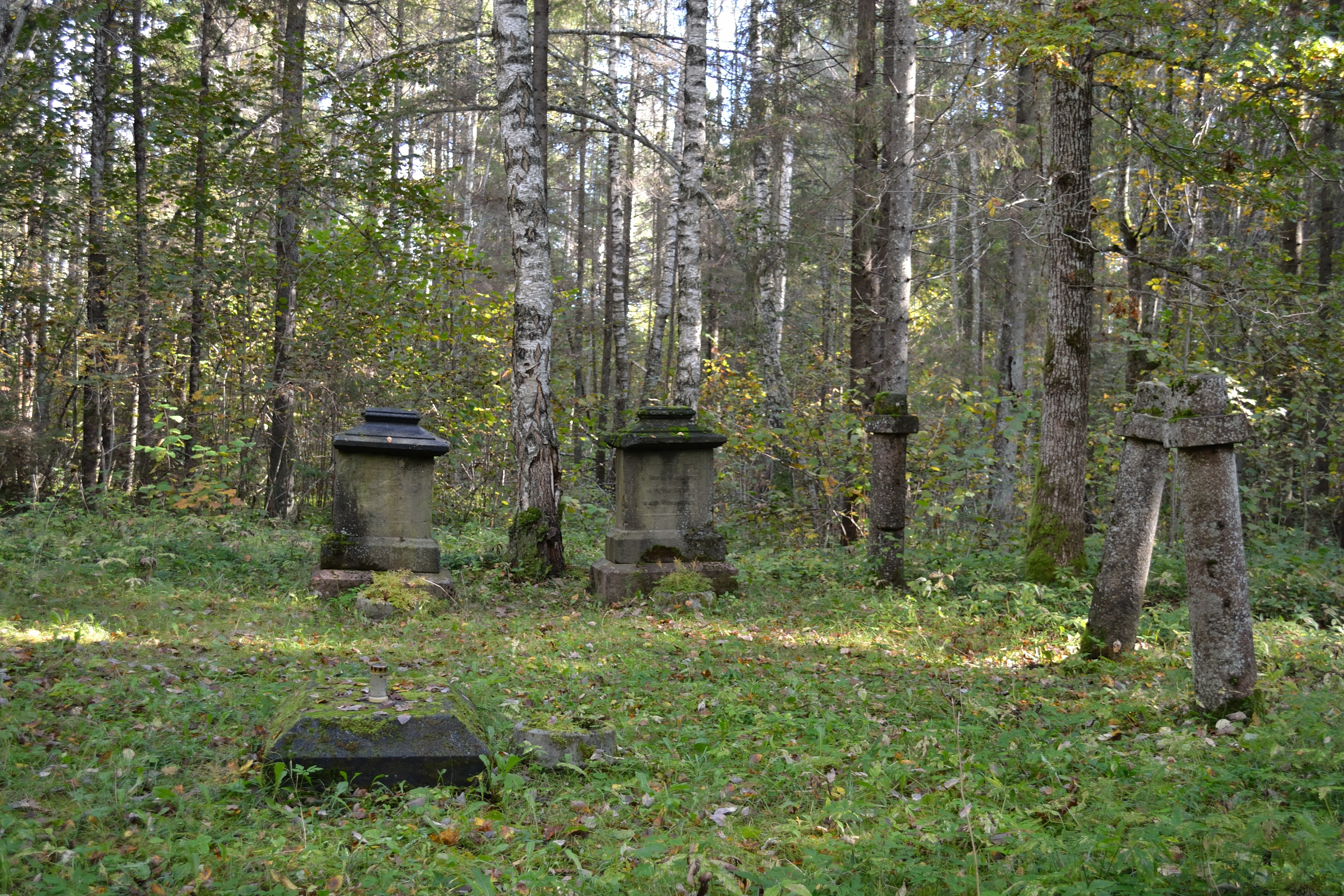 Raikküla mõisa kalmistu